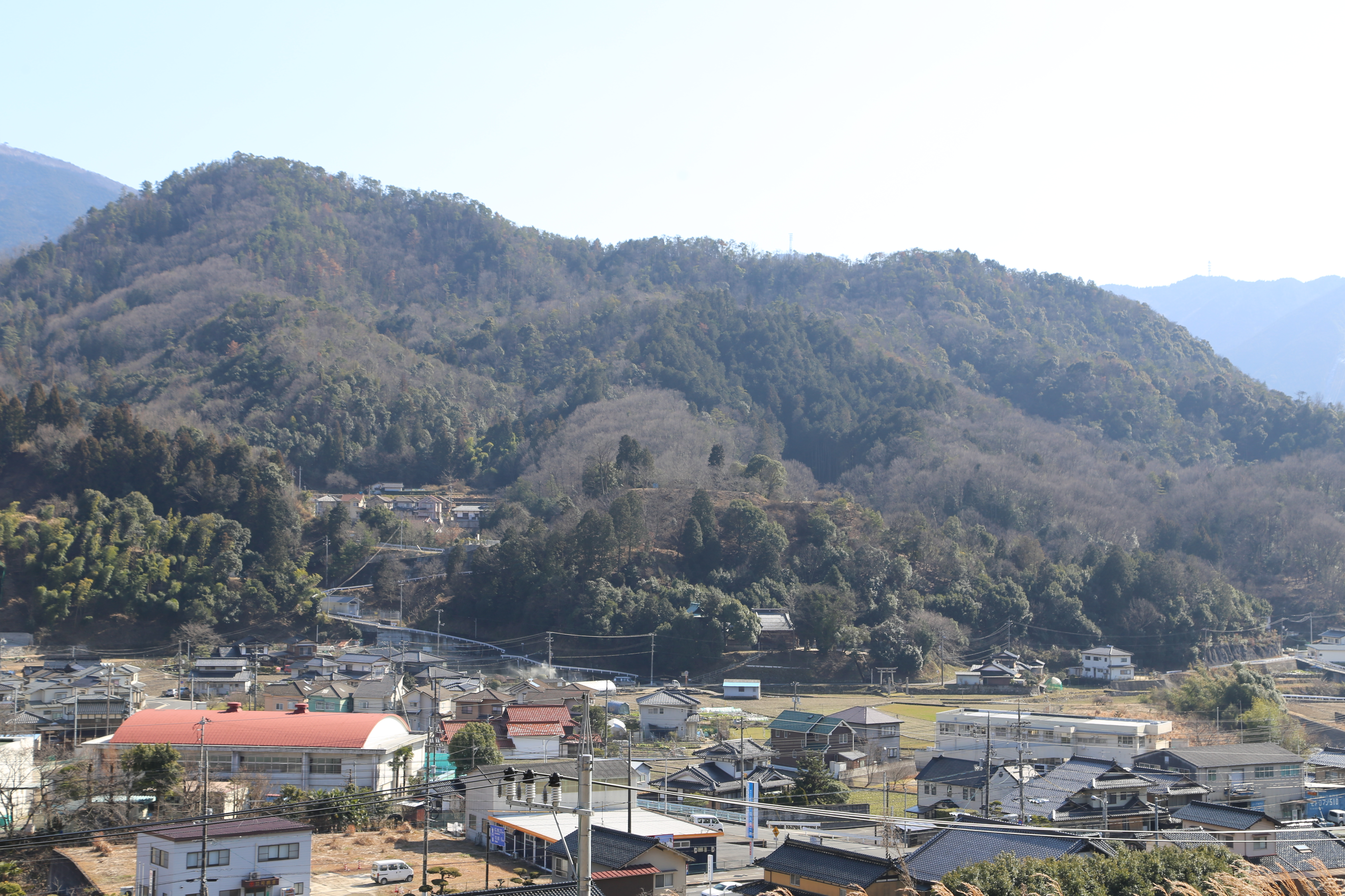 安芸国伊勢ヶ坪城遠景 Canon EOS 6D